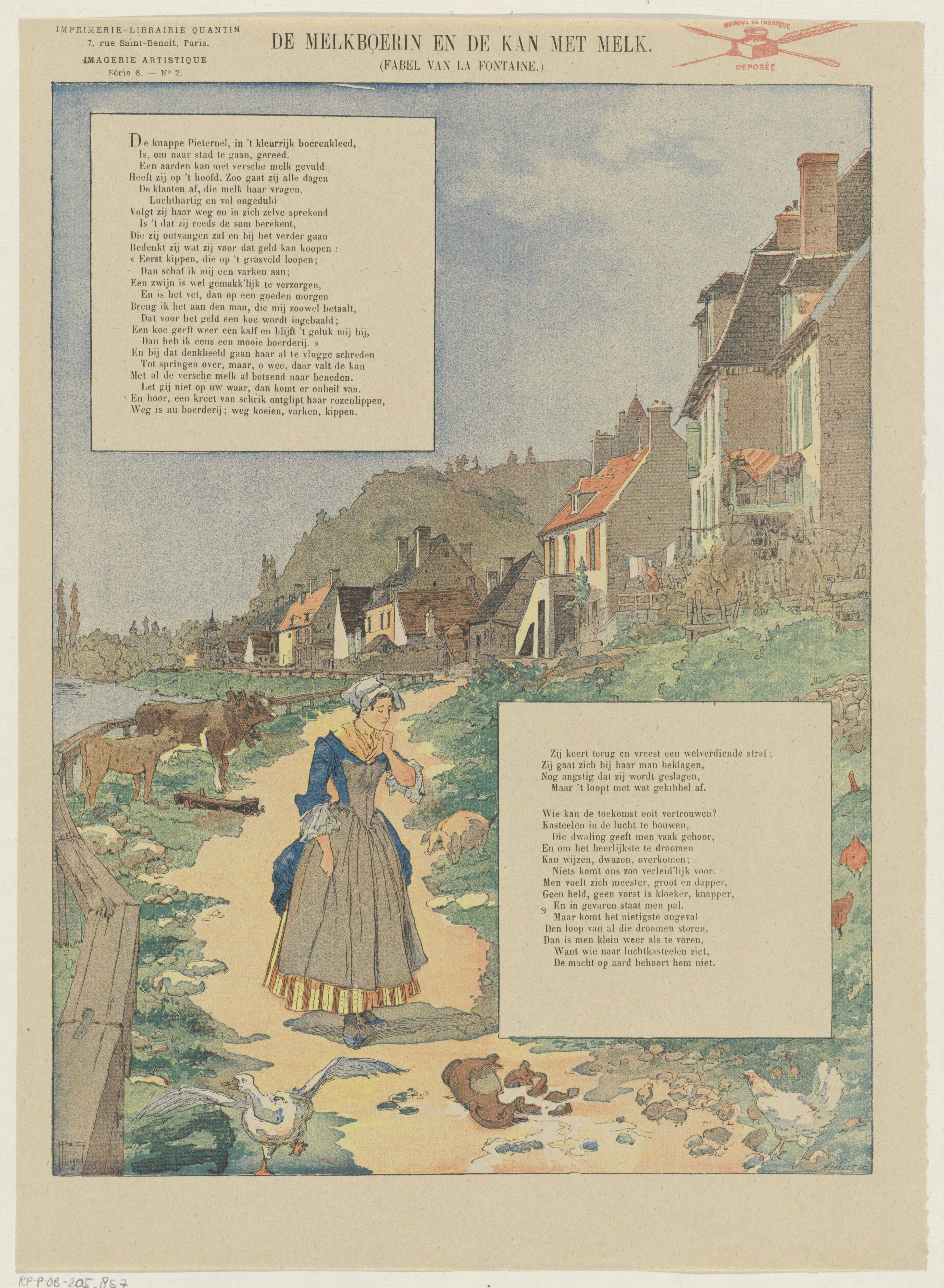 IdentificatieTitel(s): De melkboerin en de kan met melk (titel op object)Fabel van La Fontaine (serietitel op object)Imagerie Artistique / Série 6 (serietitel op object)Objecttype: prent volksprent Serienummer: 2/20Objectnummer: RP-P-OB-205.857Opschriften / Merken: verzamelaarsmerk, verso, gestempeld: Lugt 2760octrooivermelding, recto rechtsboven, gestempeld: ‘marque de fabrique / deposée’, rode stempel met inktpot, pen en schrijfveerOmschrijving: Blad met een grote voorstelling uit de fabel van Jean de La Fontaine, van de melkboerin en de kan met melk. Linksboven en rechtsonder tekstblokken met versregels. Genummerd linksboven: Série 6. - No. 2.VervaardigingVervaardiger: prentmaker: Michelet (vermeld op object)ontwerper: Hermann Vogel (vermeld op object)uitgever: Albert Quantin (vermeld op object)Plaats vervaardiging: ParijsDatering: 1876 - 1890 en/of 1888Fysieke kenmerken: kleurenlithografie en tekst in boekdrukMateriaal: papier Techniek: kleurenlithografie (procedé) / boekdrukAfmetingen: blad: h 366 mm × b 268 mmOnderwerpWat: fabelsmilkmaidVerwerving en rechtenCredit line: Schenking van de heer F.G. Waller, AmsterdamVerwerving: schenking 1923Copyright: Publiek domein